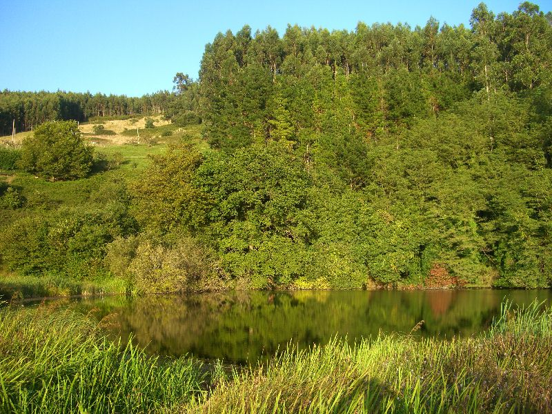 El pozo Tremeo es un lago natural de 11 metros profundidad que se encuentra en la localidad de Rumoroso (Cantabria)